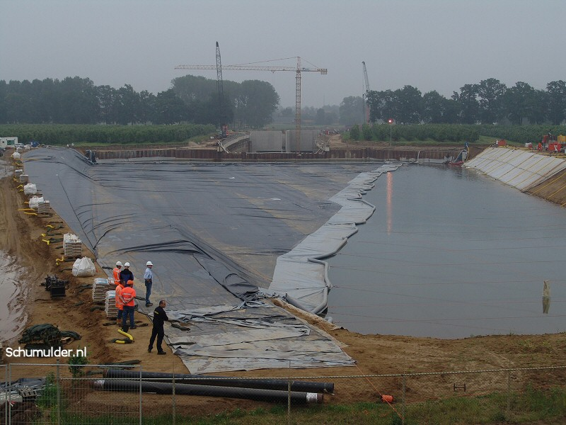 Folie plaatsing bouw Roertunnel